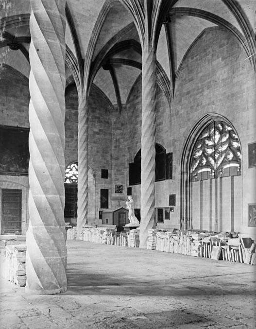 Imatge